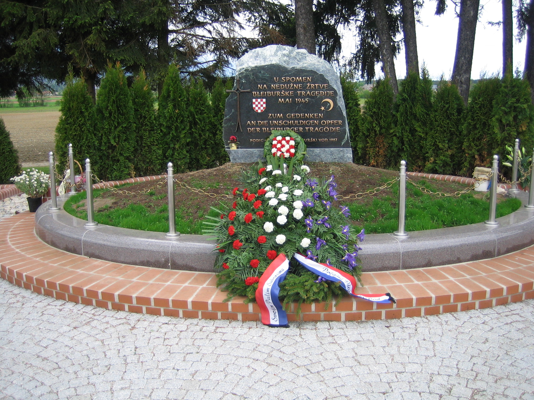 Eigene Photographie